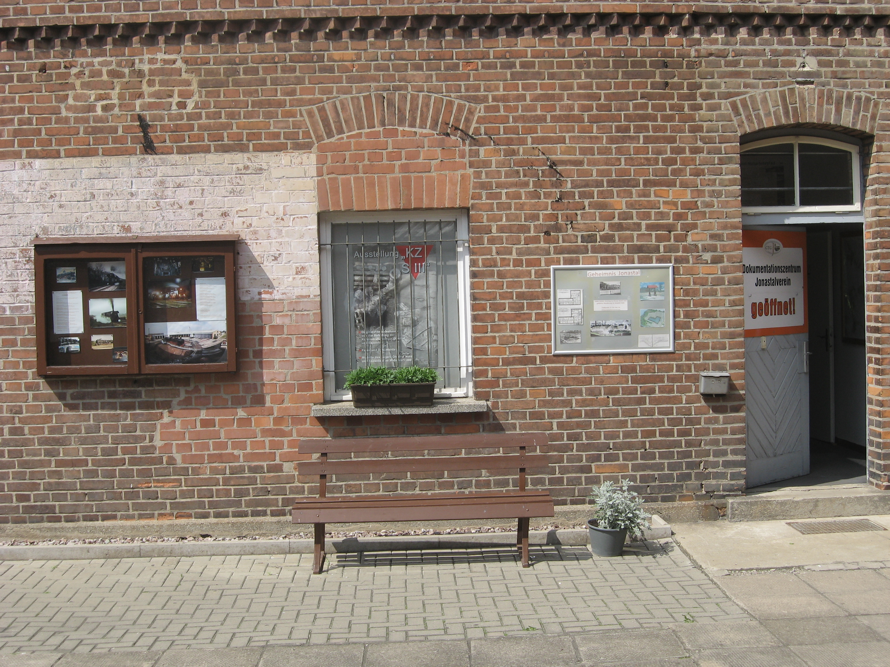 Eingang zum Dokumentationszentrum des Jonastalvereins in Arnstadt.